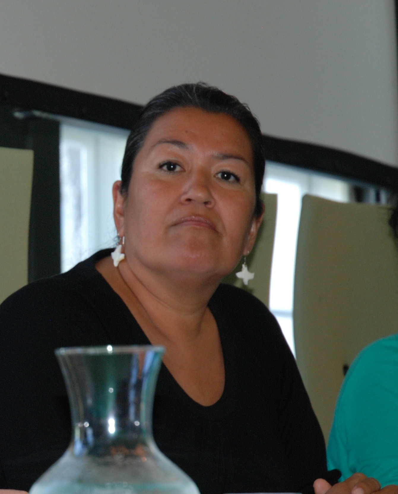 Aleqa Hammond, Landsstyreformand Grønland